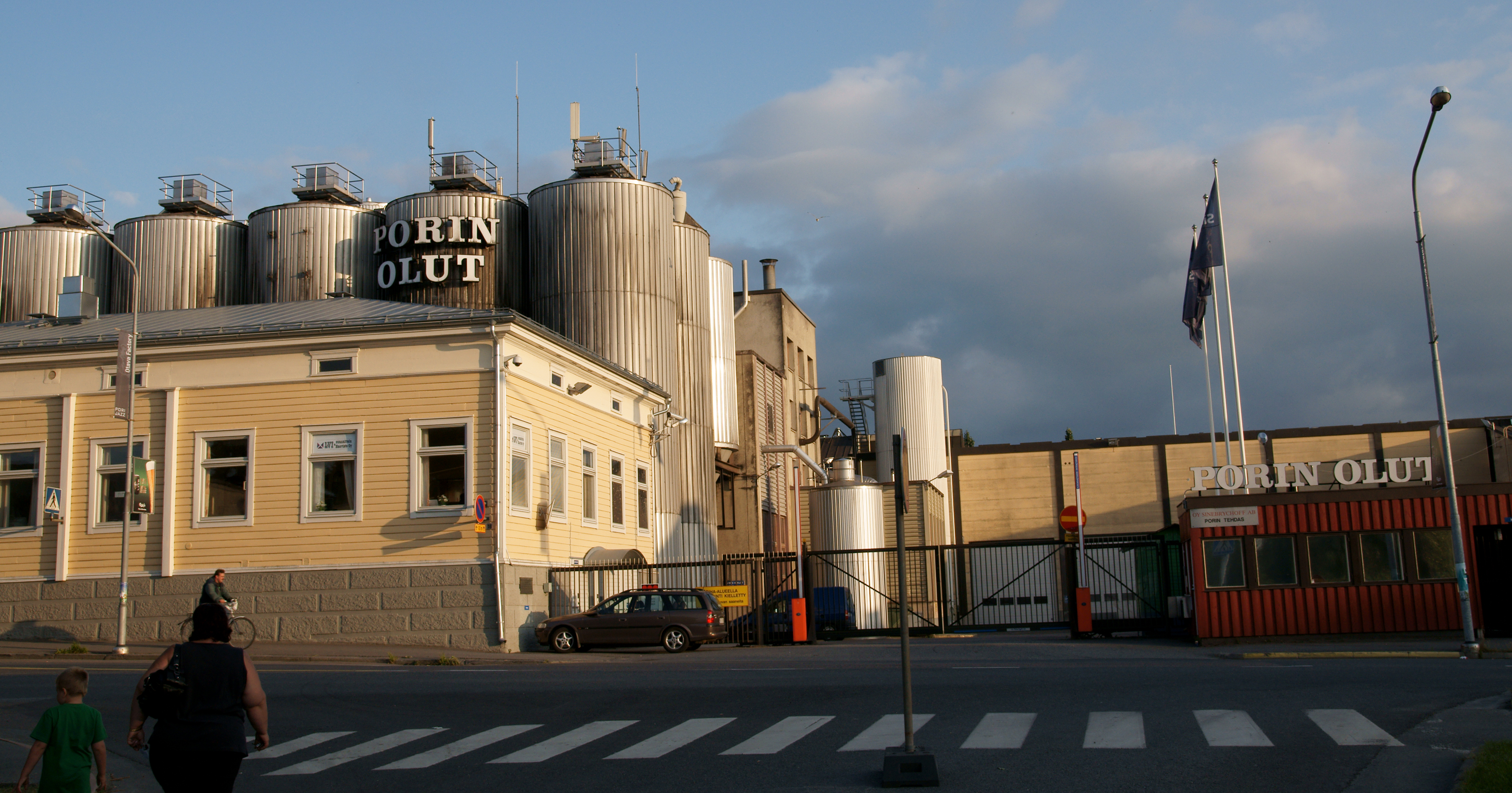 Porin oluttehdas.